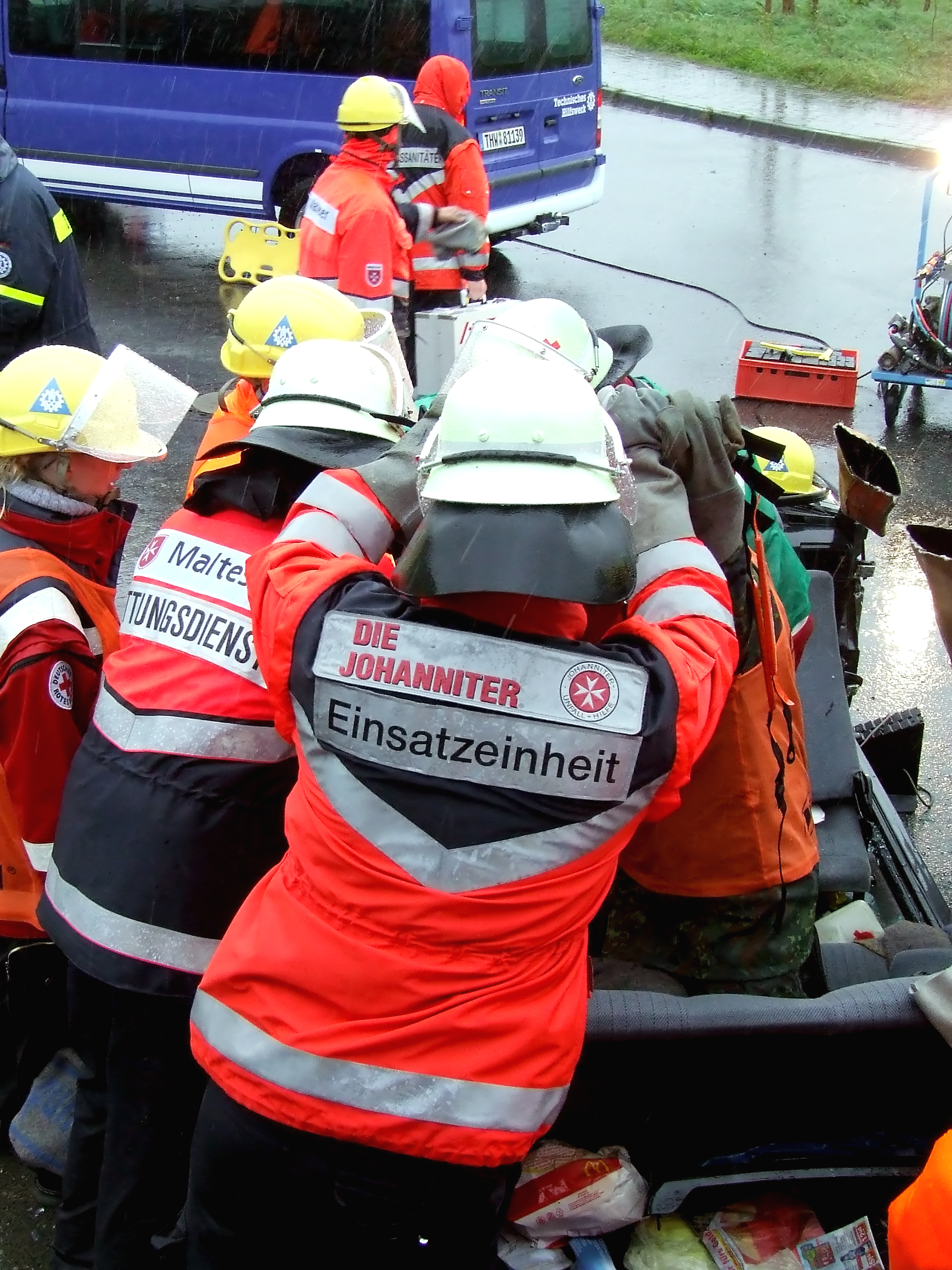 Mitglieder verschiedener Hilfsorganisationen, wie auch BOS, während einer gemeinsamen Übung (technische Hilfeleistung im Verbund mit Personenrettung).